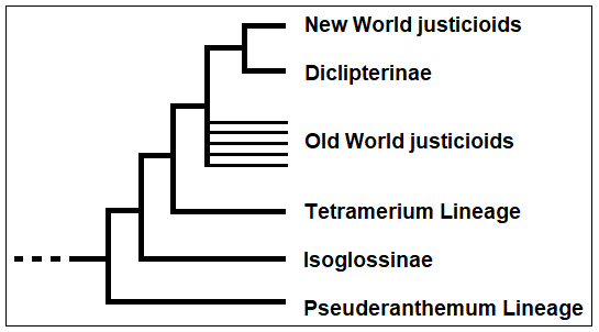 Cladogramma_della_tribù Justicieae (Acanthaceae)